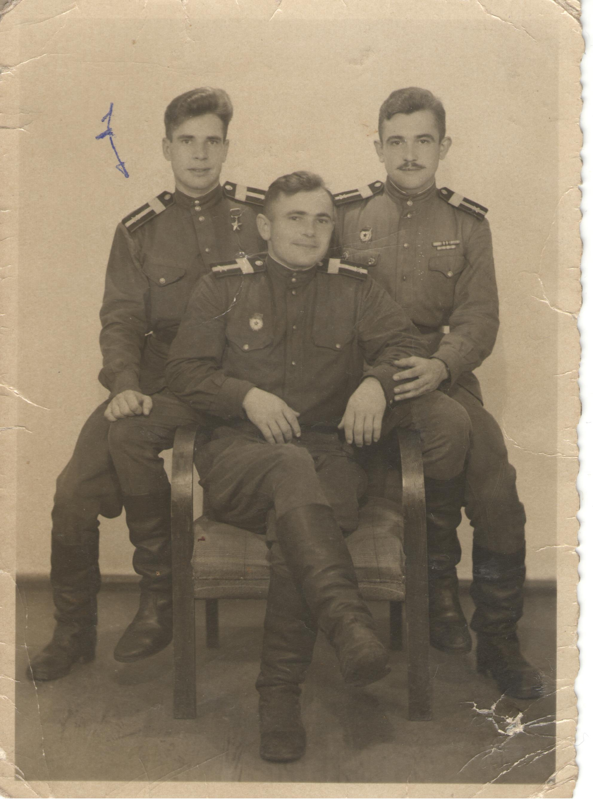 встреча однополчан